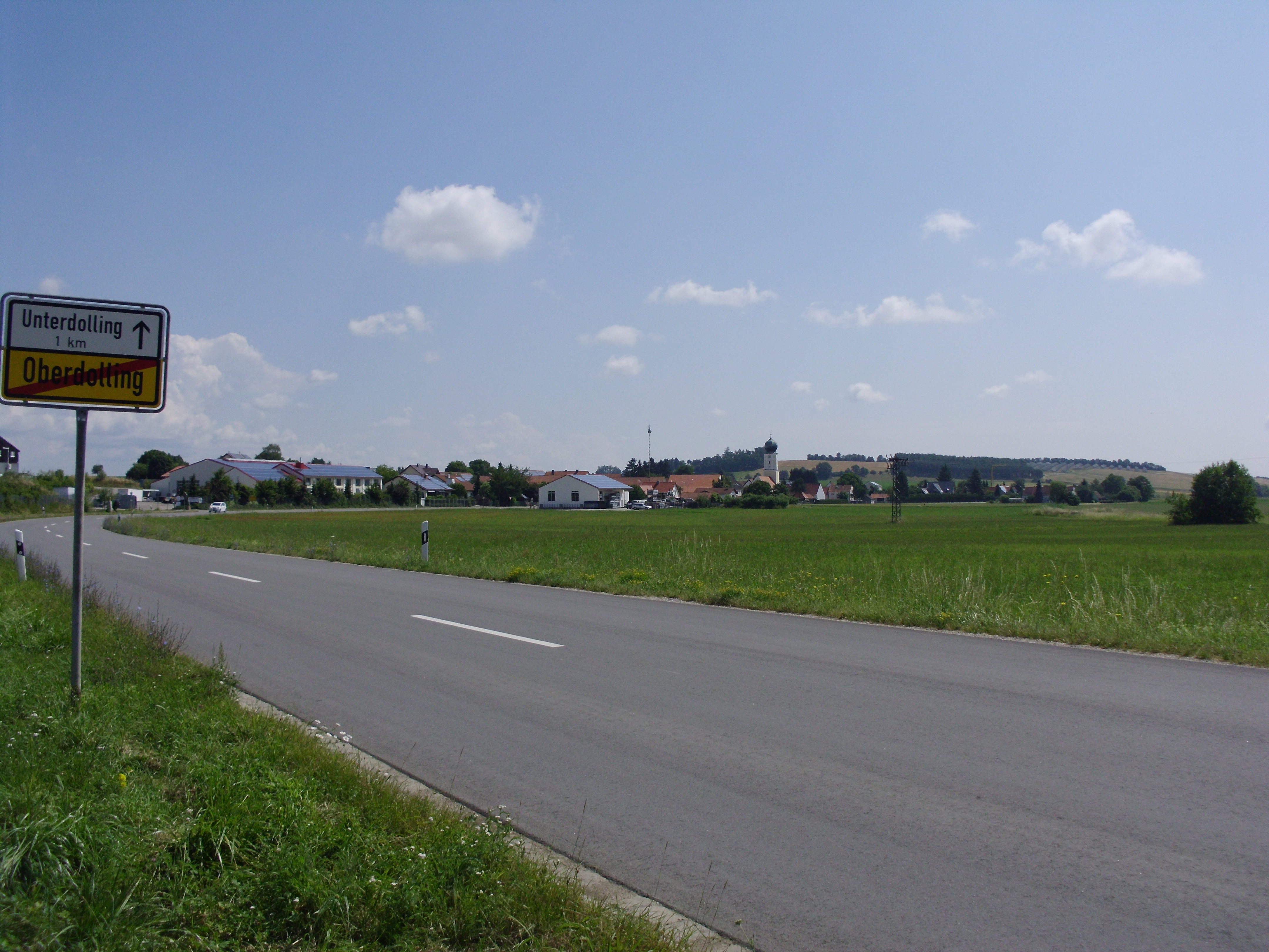 Unterdolling, Gemeinde Oberdolling im oberbayerischen Landkreis Eichstätt